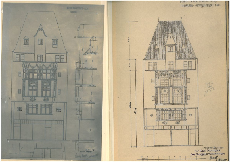 Baugesuchsteile zu Kaiserstr. 12 und 14, Heilbronn; der linke Entwurf wurde ausgeführt. Stadtarchiv HN, Signatur A034-2845